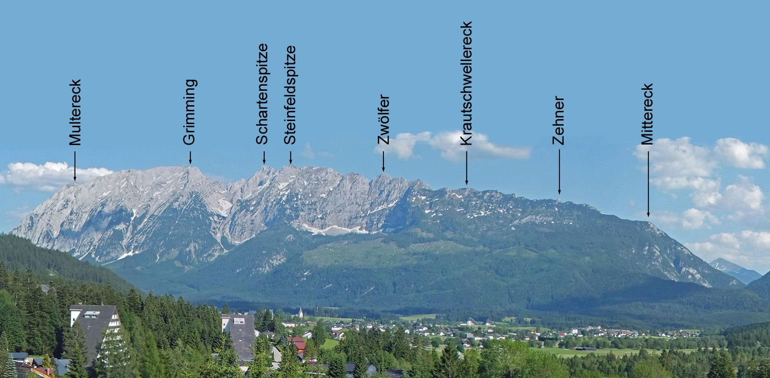 Bad Mitterndorf mit dem Grimmung und den Bezeichnungen seiner Gipfel